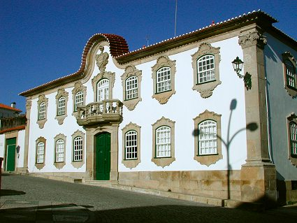 Camara Municipal da Mêda